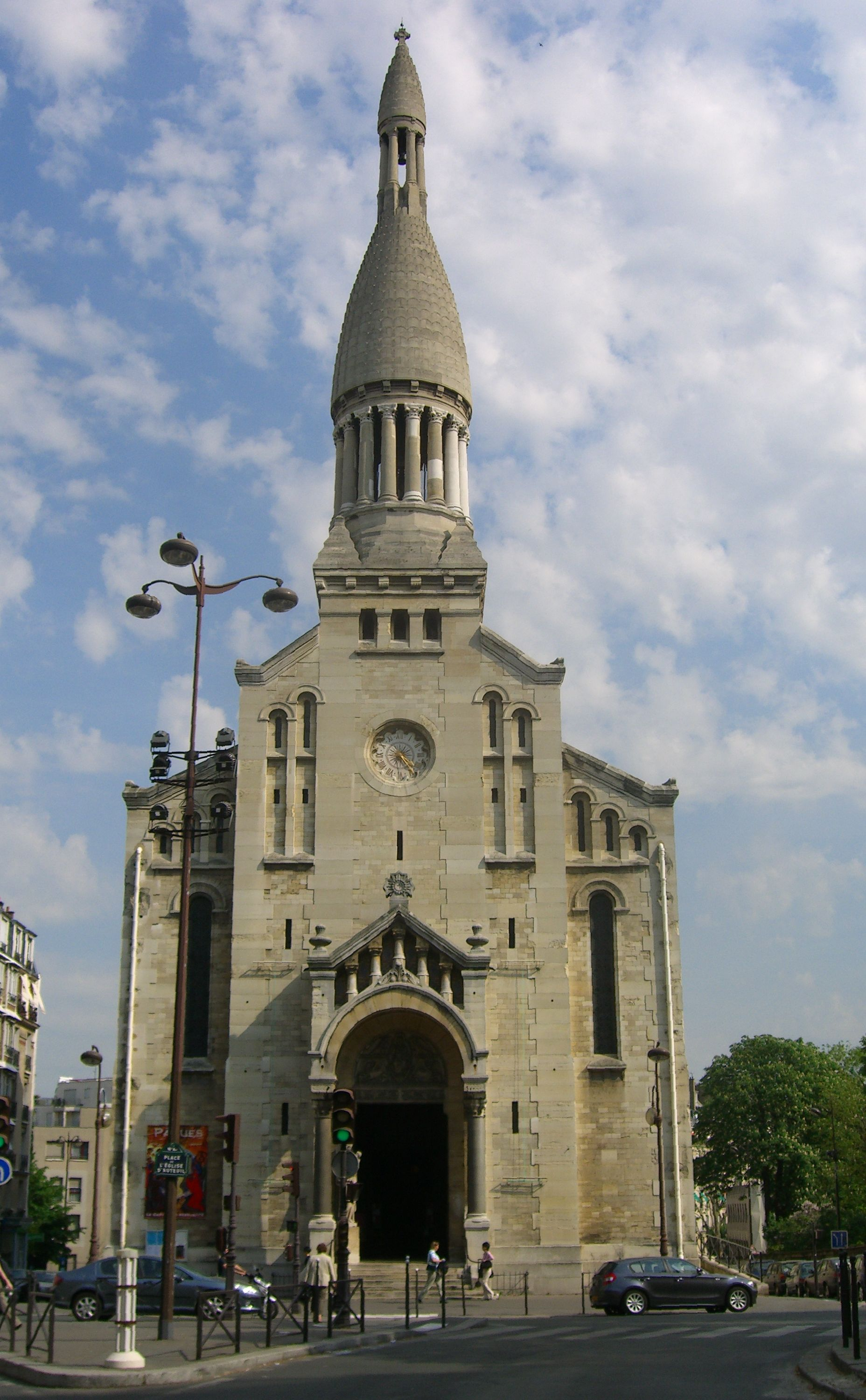 Eglise d'Auteuil